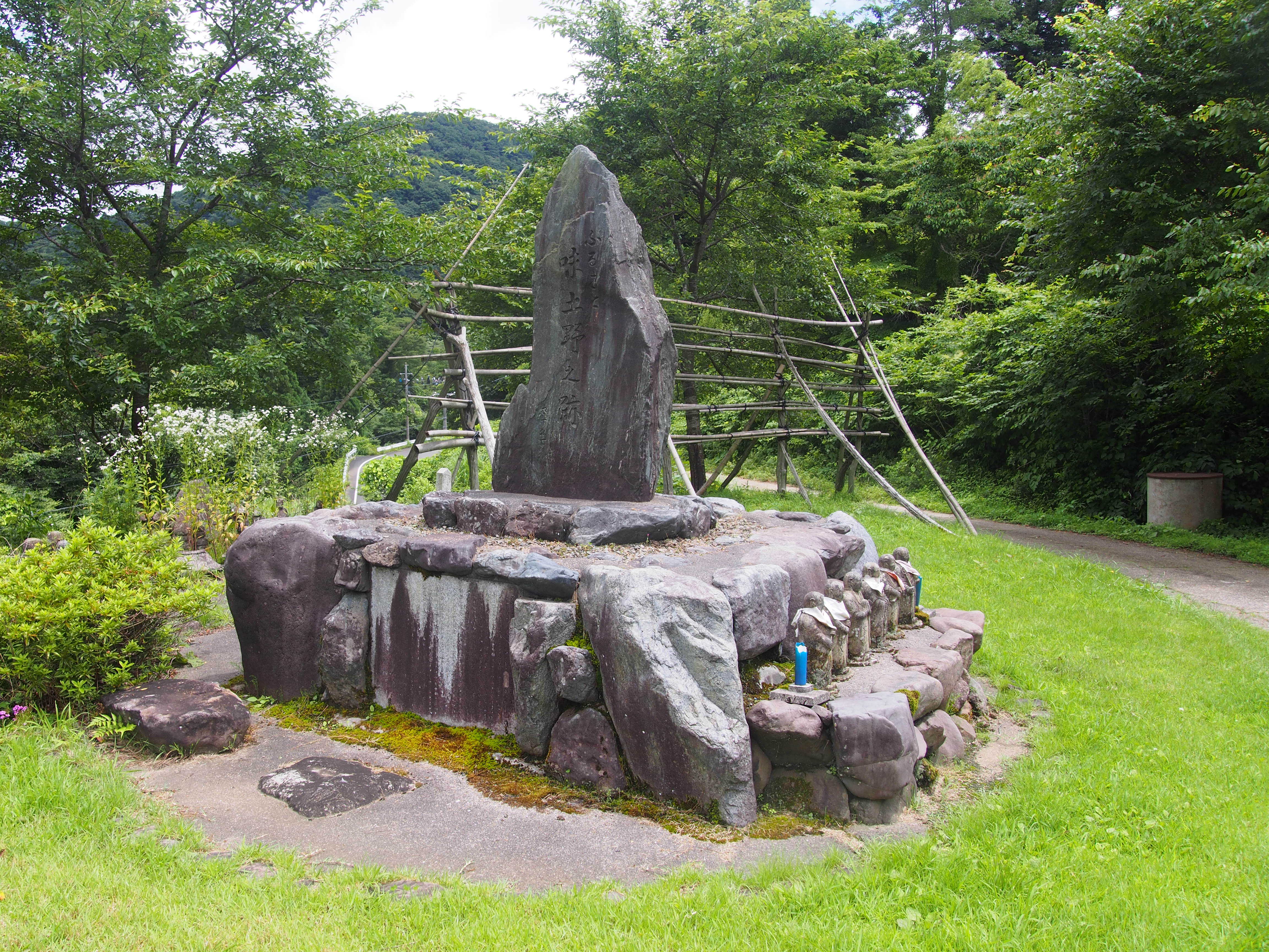 「ふるさと味土野之跡」石碑 京都府京丹後市弥栄町須川（味土野）